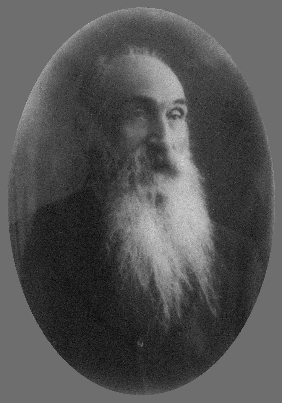 Clinio Quaranta - traduttore di opere letterarie dal latino, dal greco e dal tedesco